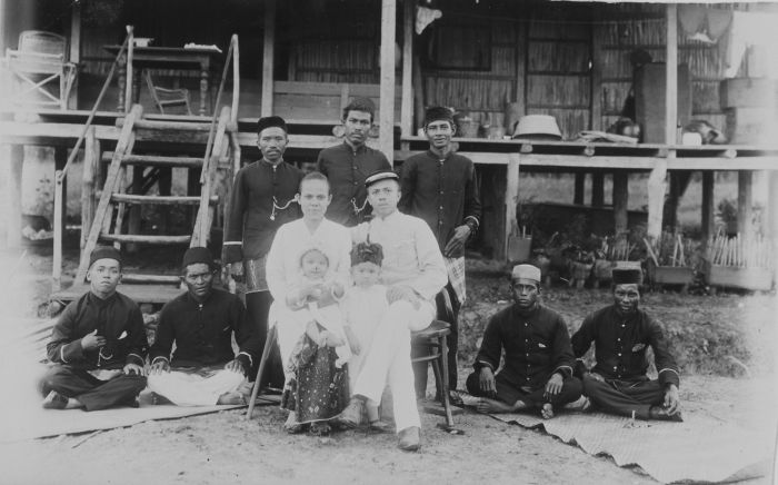 foto. Portret van een ambtenaar die de functie van Algemeen Ontvanger te Kota Baroe bekleed, met familie en personeel voor een huis in Inderagiri